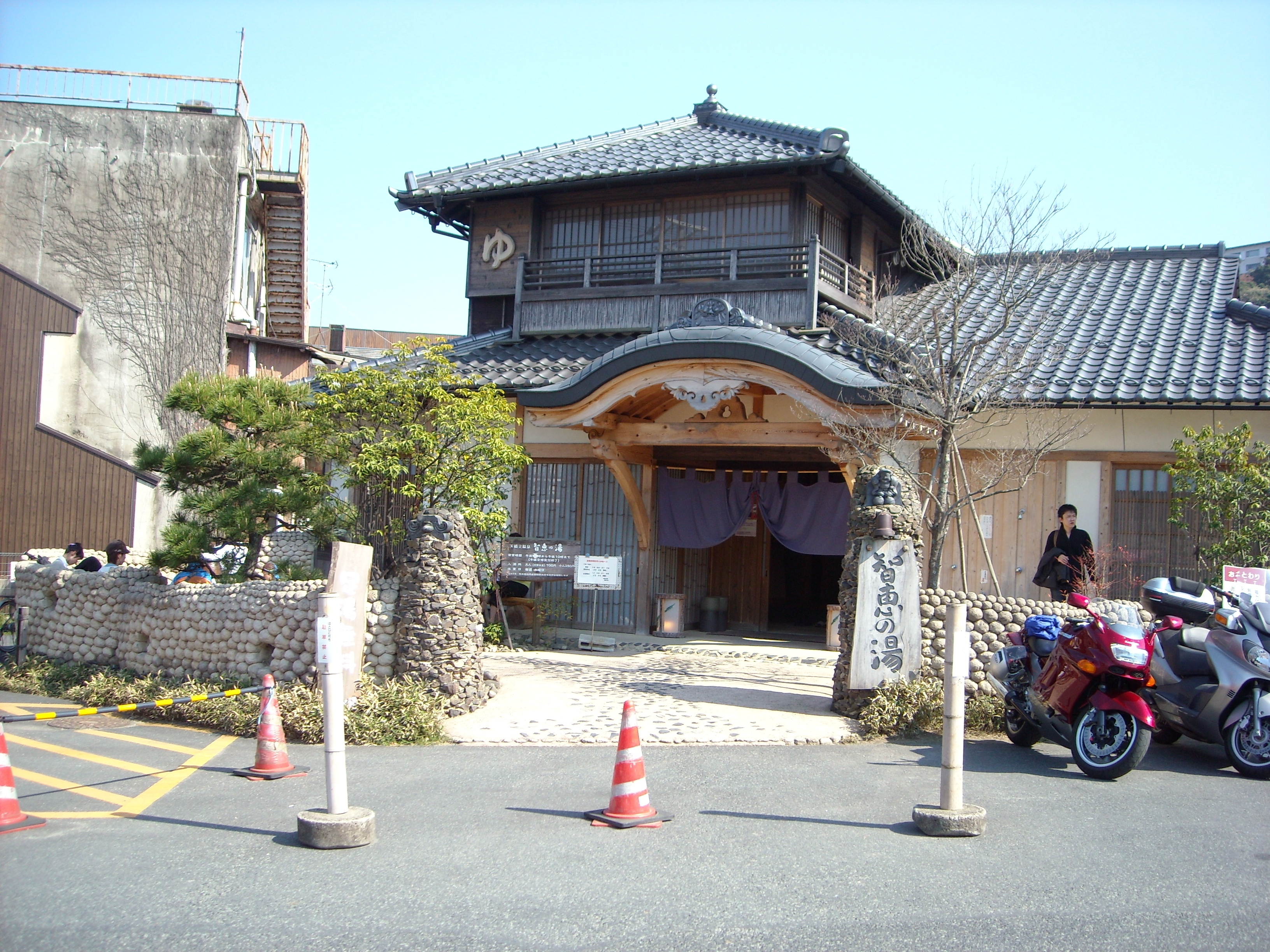 天橋立駅そばにある智恵の湯